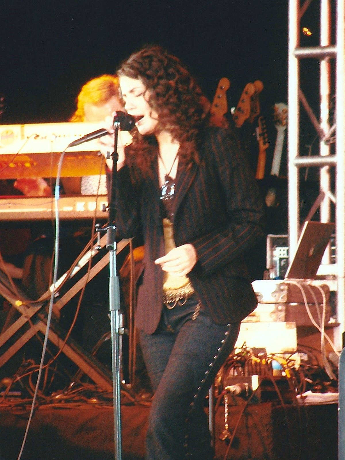 Katie Melua, Guilfest 2004